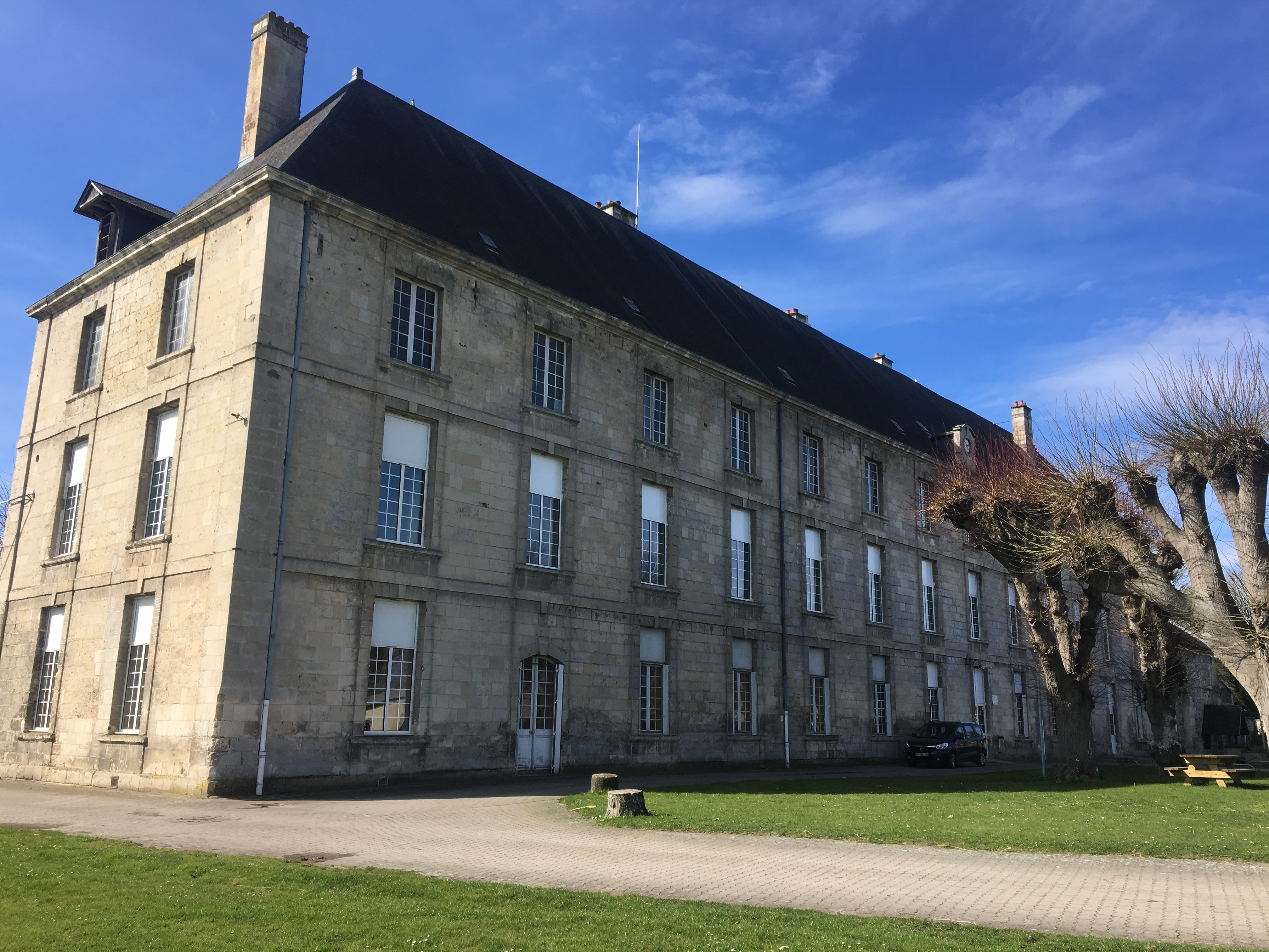 Abbaye Saint-Médard de Soissons